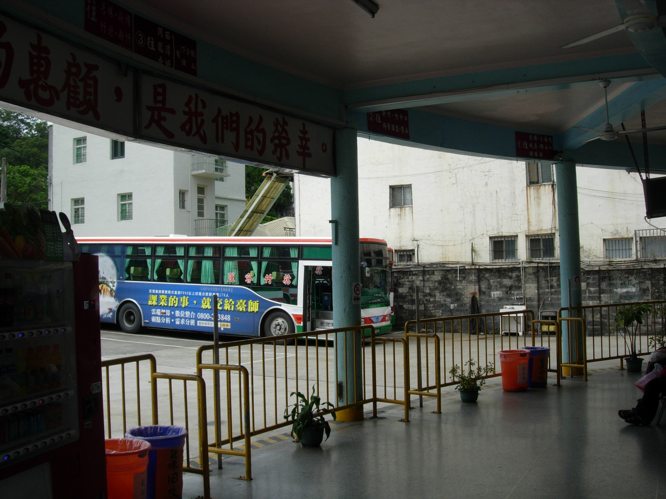 中文（台灣）: 新竹客運竹東站月台1